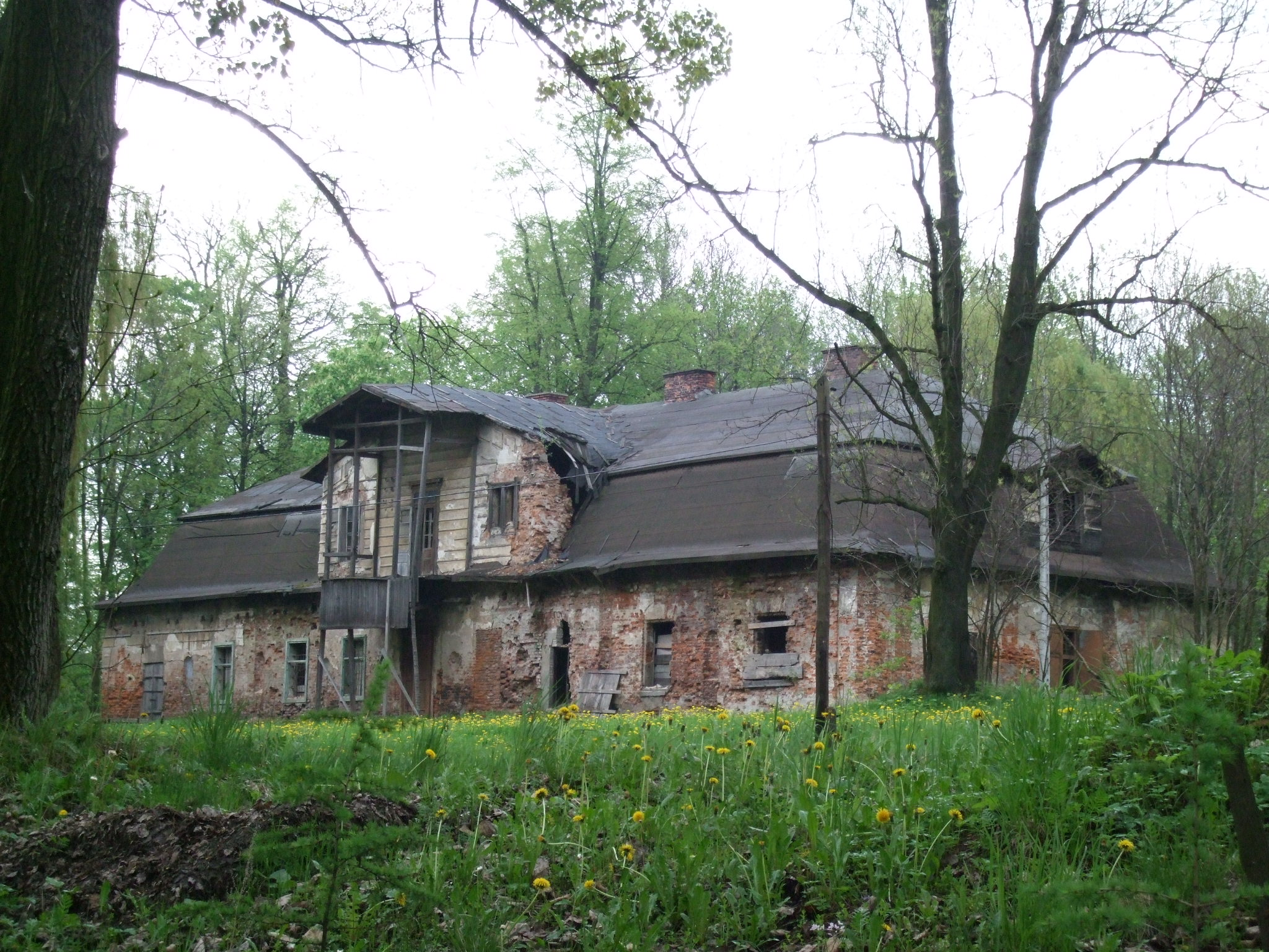 Dwór Czartoryskich z XVIII wieku w Brzeźnicy.